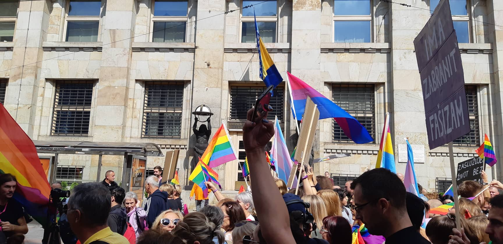 Parada e parë e Krenarisë në Bosnje-Hercegovinë.